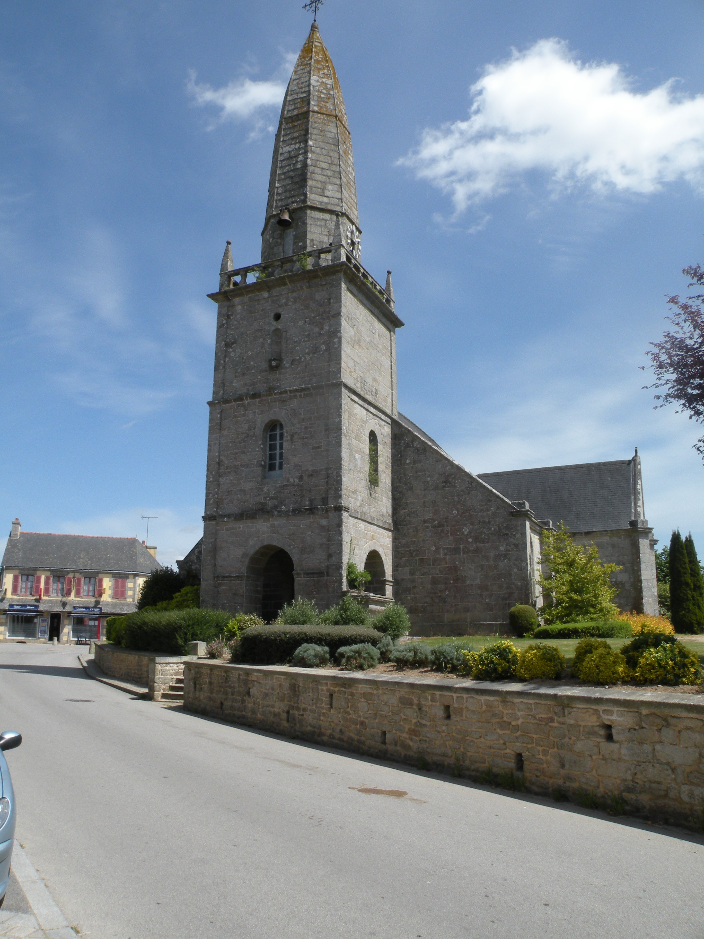 eglise de Malguénac